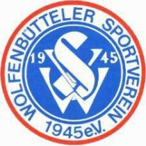 Wappen des Wolfenbütteler Sportverein von 1945 e.V. (Verein existier seit dem 30.06.2002 nicht mehr, fusionierte mit dem MTV Wolfenbüttel e.V. von 1848)